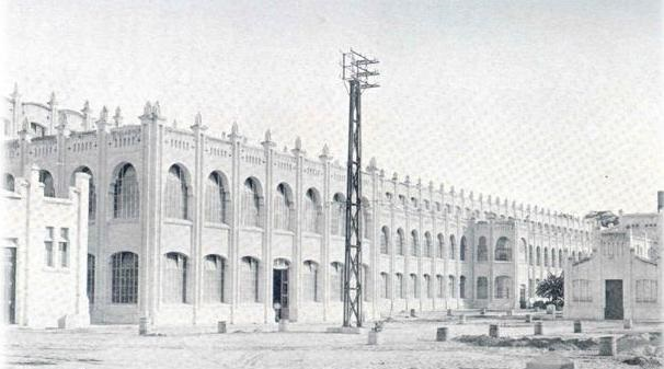 Antiguo edificio de Telares de Maracay